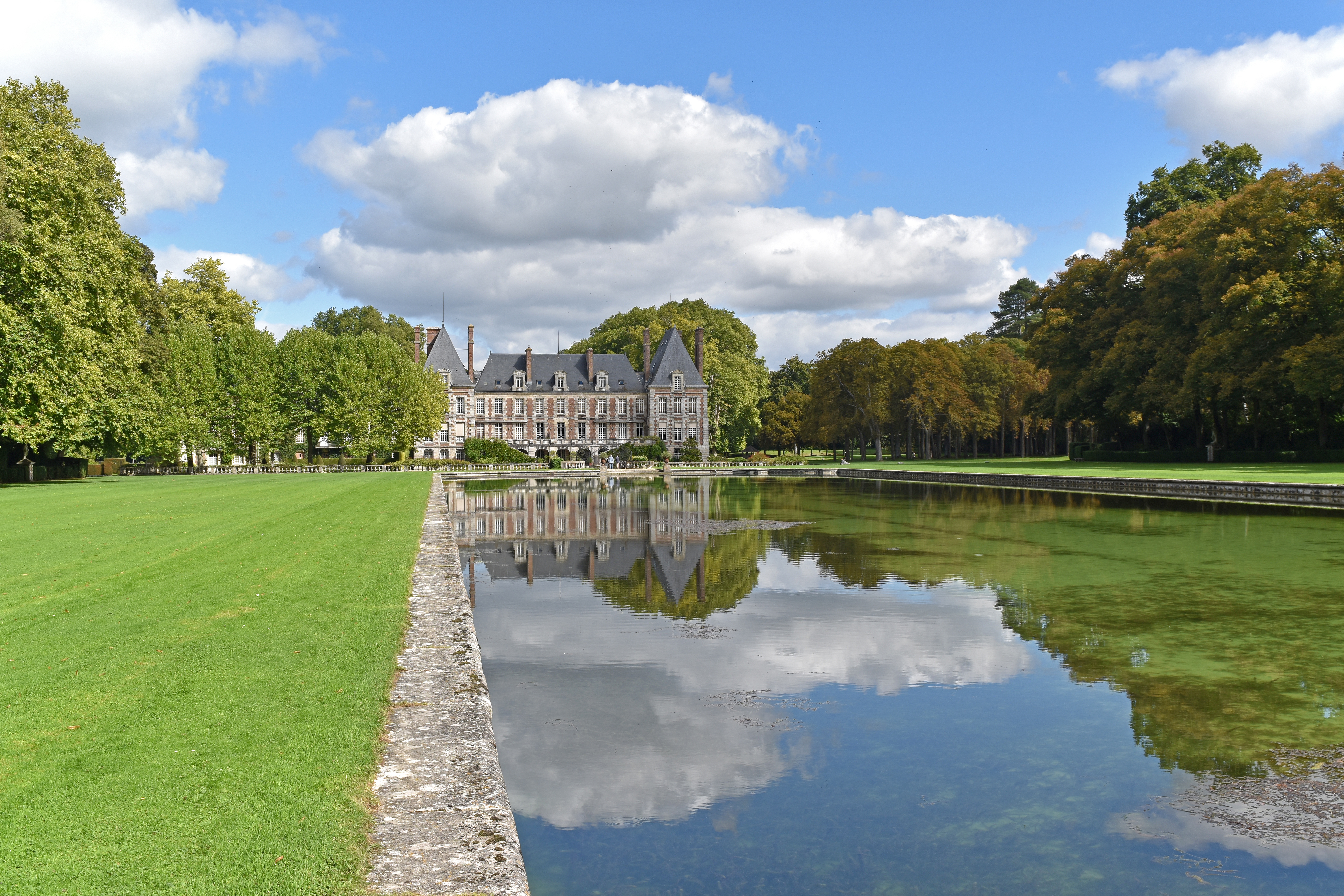 Château de Courances, Essonne, France .